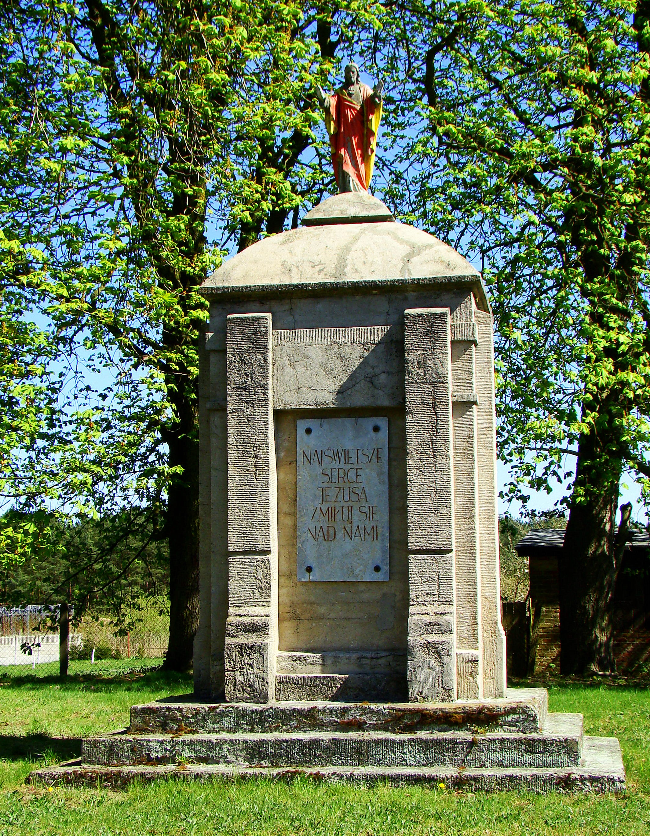 Kościół pod wezwaniem Najświętszej Marii Panny w Niekłończycy (przykościelna figurka Jezusa Chrystusa), (Gmina Police, Województwo zachodniopomorskie), Polska